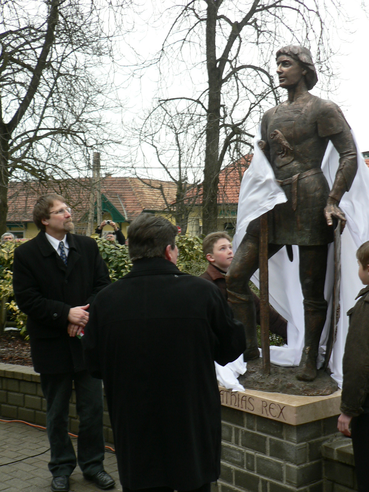 A Mátyás-szobor (Kovács Jenő, 2009) avatása. - Solymár, Templom tér 26., az iskola udvarában, a bejárattól balra.